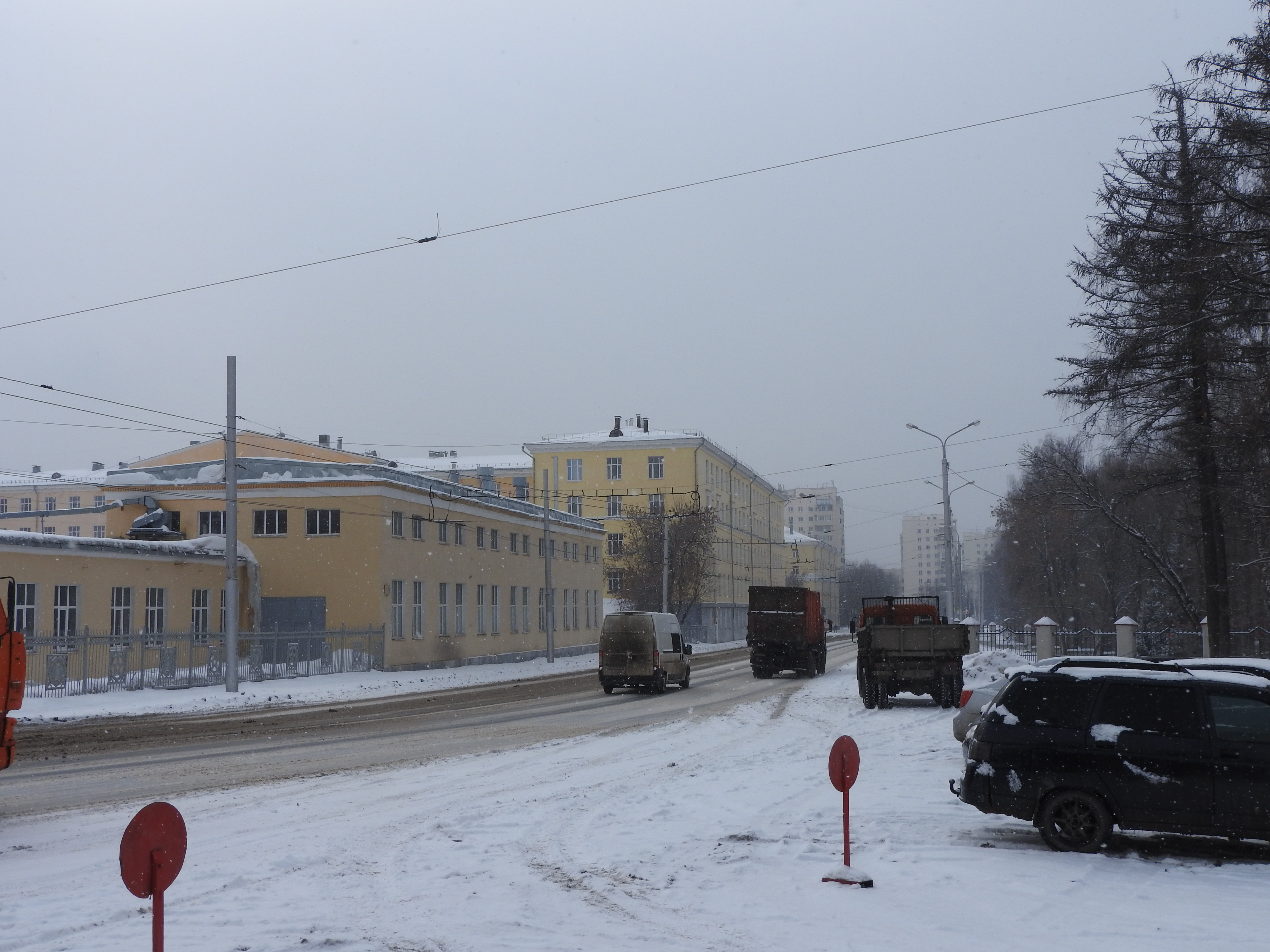 Улица Комарова, Уфа